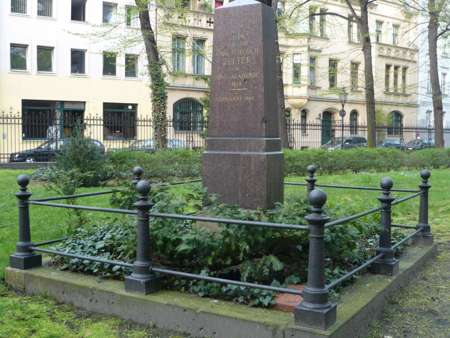 Carl Friedrich Zelter, * 11. Dezember 1758 in Berlin , † 15. Mai 1832 in Berlin. Zelters Grab (grave of Zelter) mit einem ca. 2 Meter hohen Obelisken und einer Gedenktafel der Sing-Akademie zu Berlin für ihren 2. Direktor auf dem alten Friedhof an der Sophienkirche in der Sophienstraße nahe der Hackeschen Höfe in Berlin-Mitte.